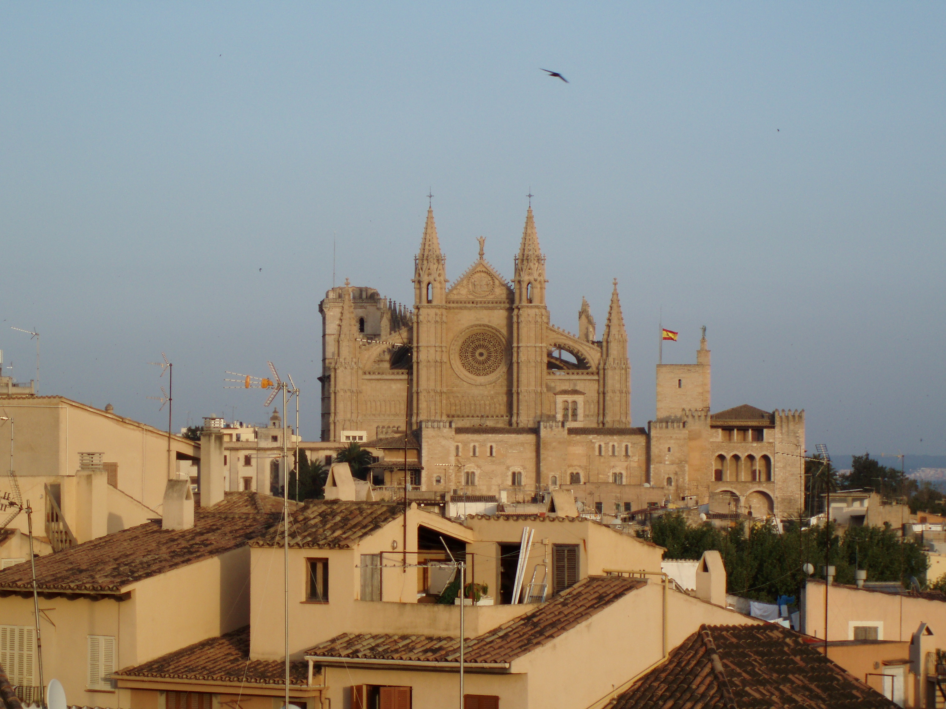 Desde lejos y atardeciendo.